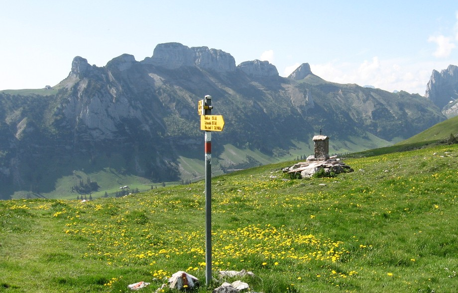 Furgglenfirst von Nordost gesehen von der Alp Sigel; links Stauberen, dann die Hüser, Hochhus und Saxer Lücke als Abschluss.